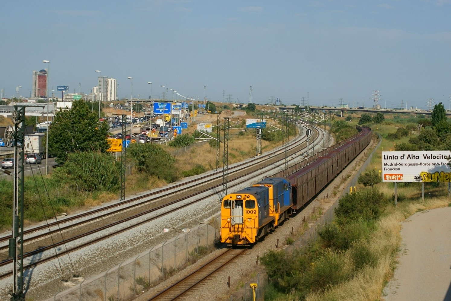 [CAT]: Si anteriorment ja vaig penjar la entrada al port del Autometro, ara li toca el torn al servei invers anant de buit cap a la factoria SEAT de Martorell. [ES]: Si anteriormente ya colgué la entrada al puerto del Autometro, ahora le toca el turno el servicio inverso yendo de vacío hacia la factoría SEAT de Martorell.